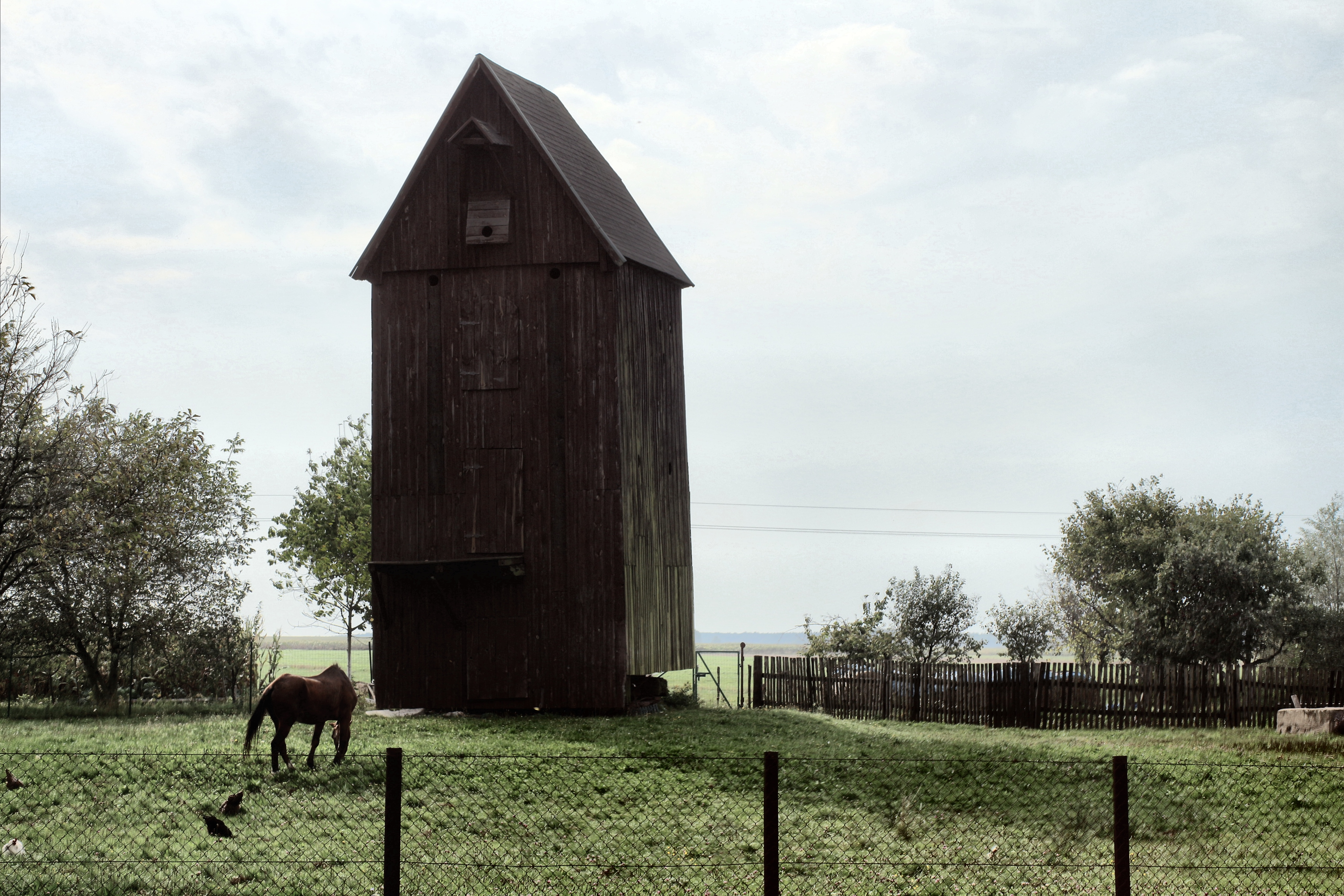 Nowa Wieś, wiatrak koźlak, 1764